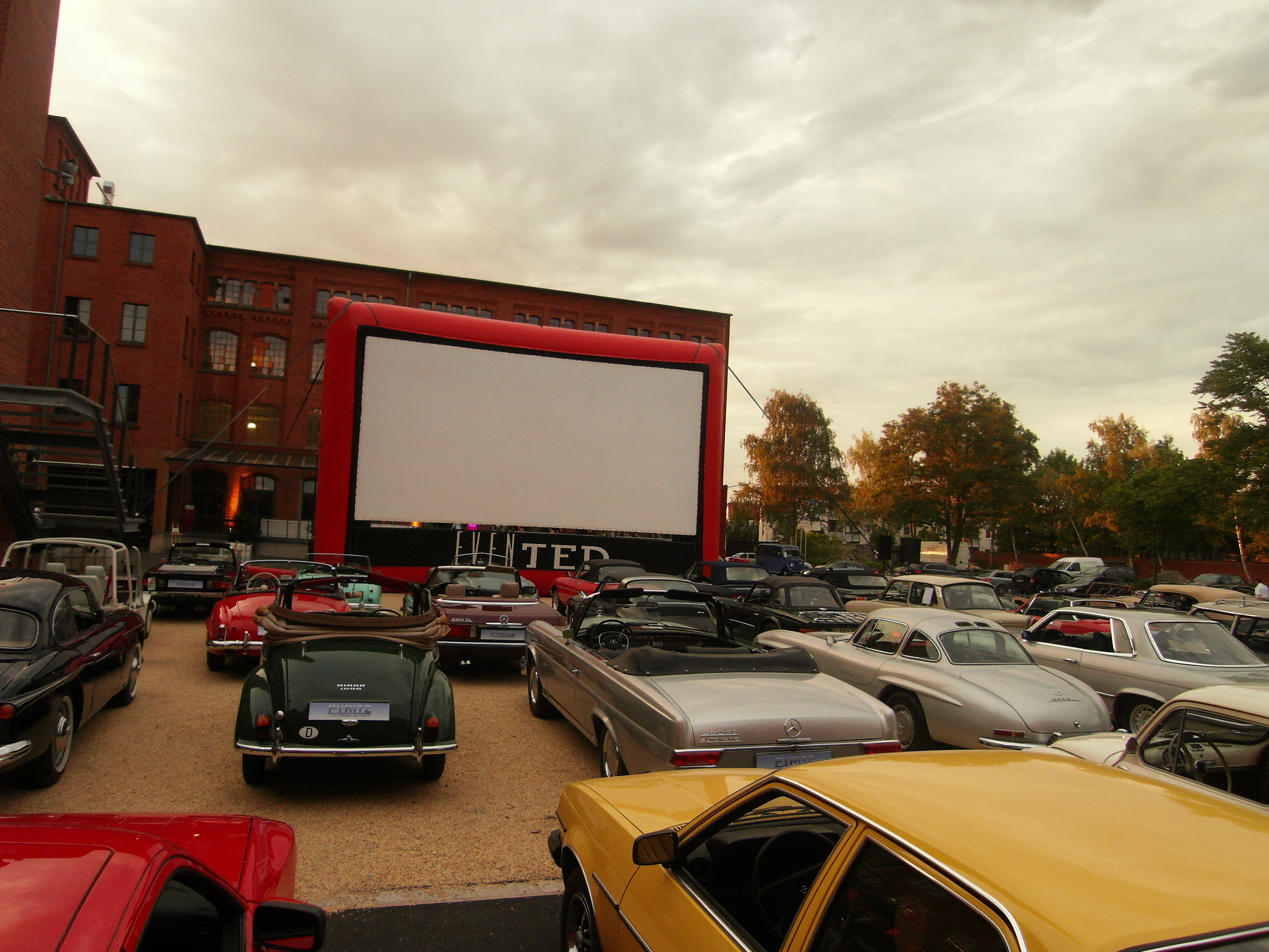 Luftgekühltes Autokino in der Klassikstadt Frankfurt. Temporäre Veranstaltung für Oldtimer. Leinwandgröße 10x5m